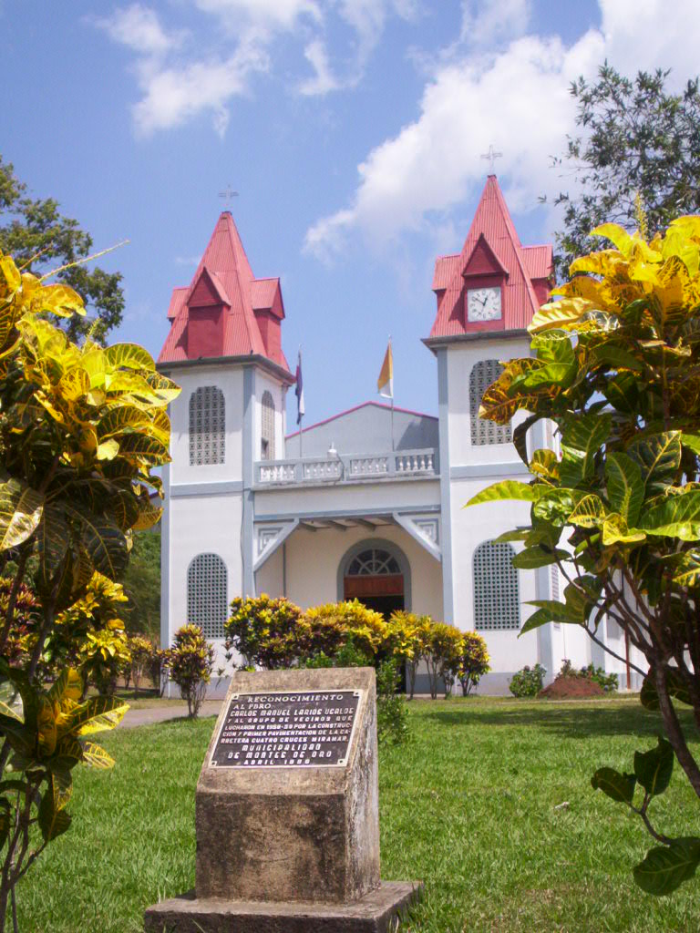 Iglesia católica de Miramar. Cantón de Montes de Oro, Provincia de Puntarenas, Costa Rica